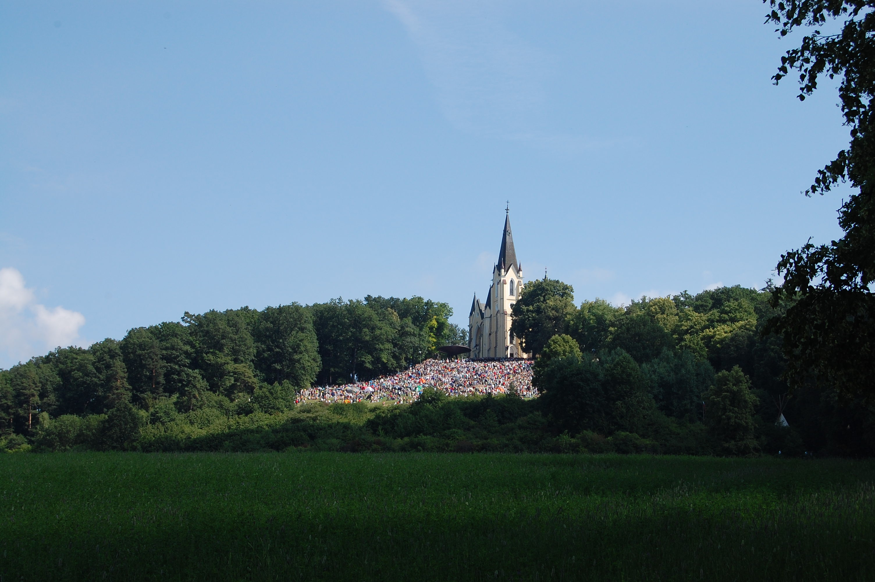 Bazilika Navštívenia Panny Márie na Mariánskej hore - púť.